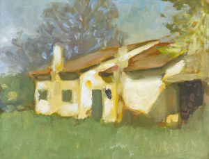 Ehemaliges Atelier in Bad Aiblingtitle QS:P1476,de:"Ehemaliges Atelier in Bad Aibling" label QS:Lde,"Ehemaliges Atelier in Bad Aibling"